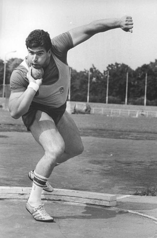 Udo Beyer Zum Beitrag: Drei Olympiafahrkarten für Geschwister Beyer- In Eisenhüttenstadt fing alles an ADN-ZB Müller-4.7.1980-ha. So kenne wir ihn: Olympiasieger Udo Beyer voller Konzentration beim Kugelstoßen. Mit 22,15 Metern ist der Weltrekord in seinem Besitz. War es in Motreal noch eine Überraschung, als er siegte, so ist sein erklärtes Ziel für Moskau die Eroberung seiner zweiten olympischen Goldmedaille. Die Fachwelt traut es ihm ohne weiters zu. (Beachten Sie hierzu auch W 0704/301-302N)